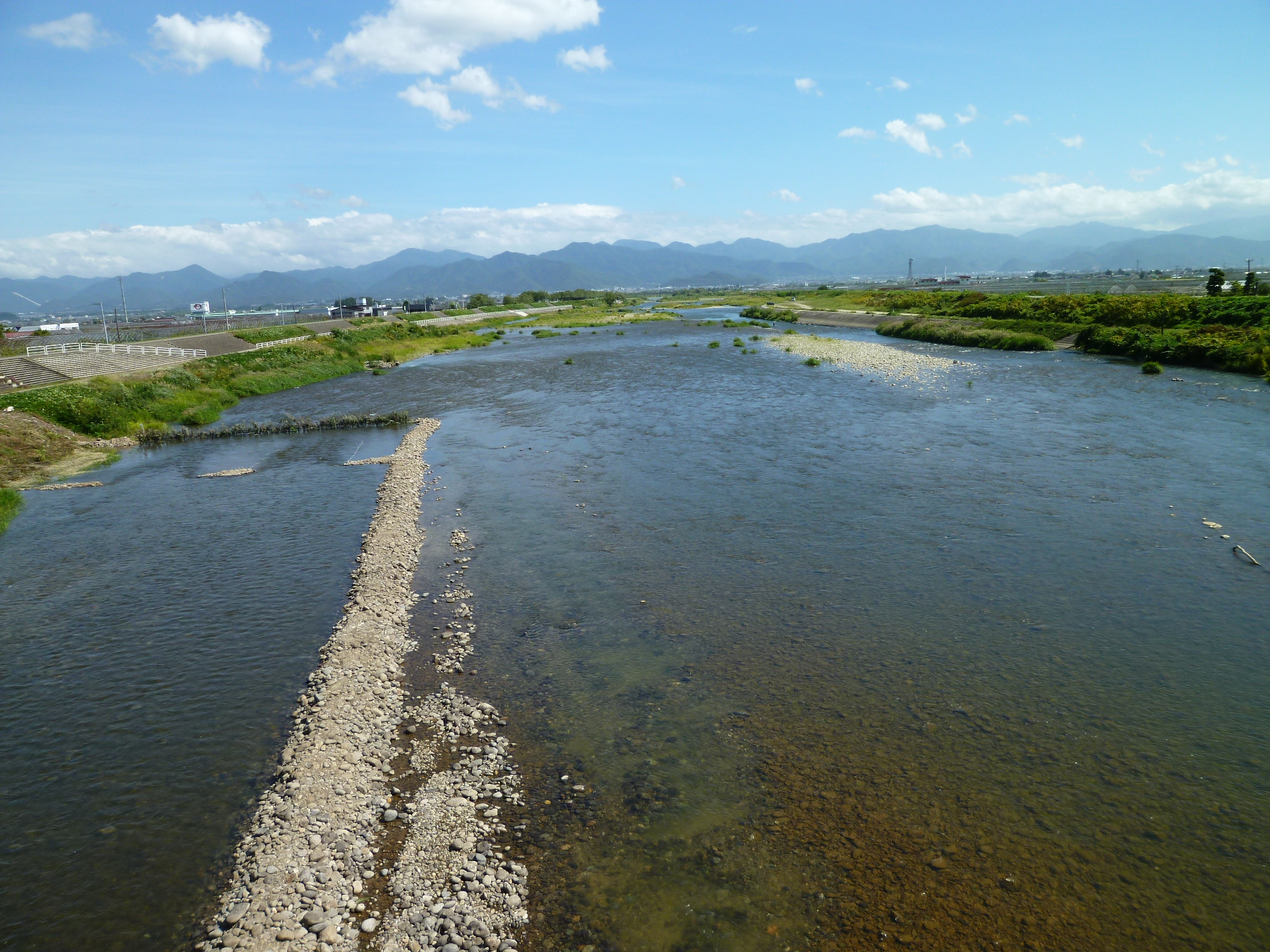 寒河江川。山形県寒河江市西根付近。県道25号の寒河江川橋から下流を望む。